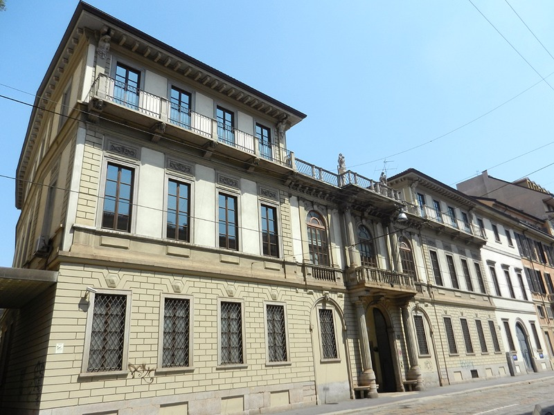 Milano - Palazzo Mellerio